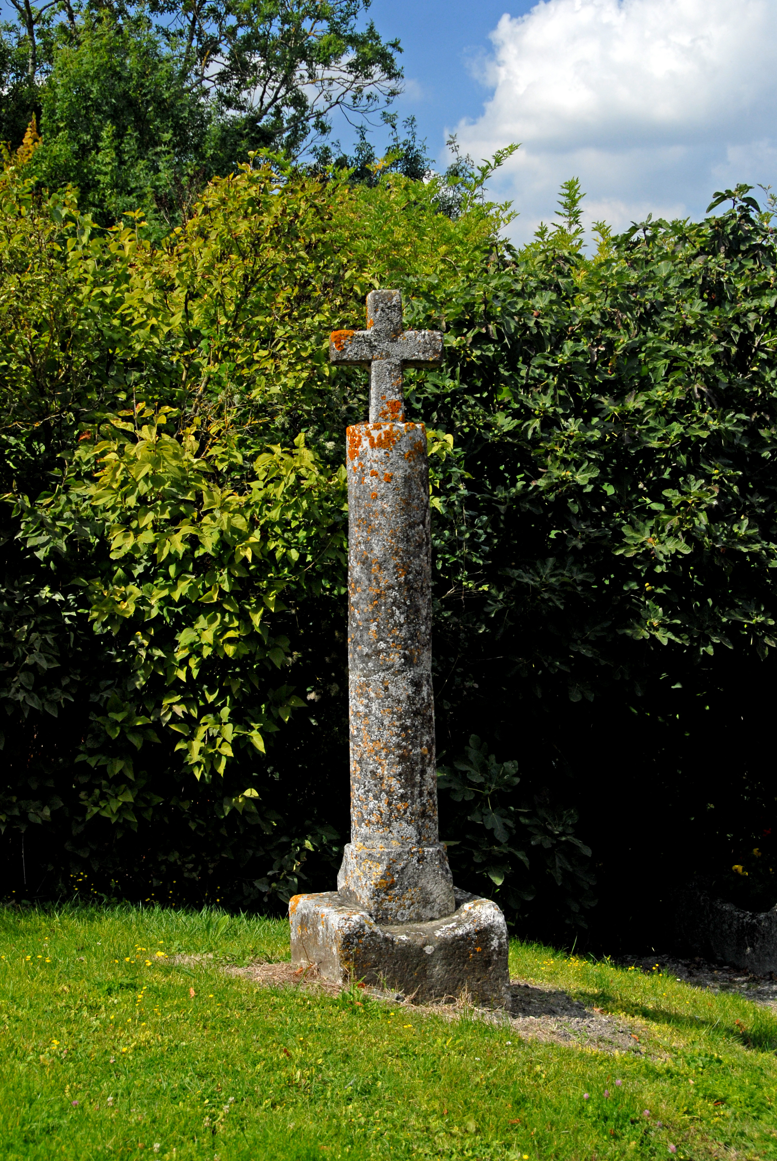 Echebrune, Stele mit Kreuz